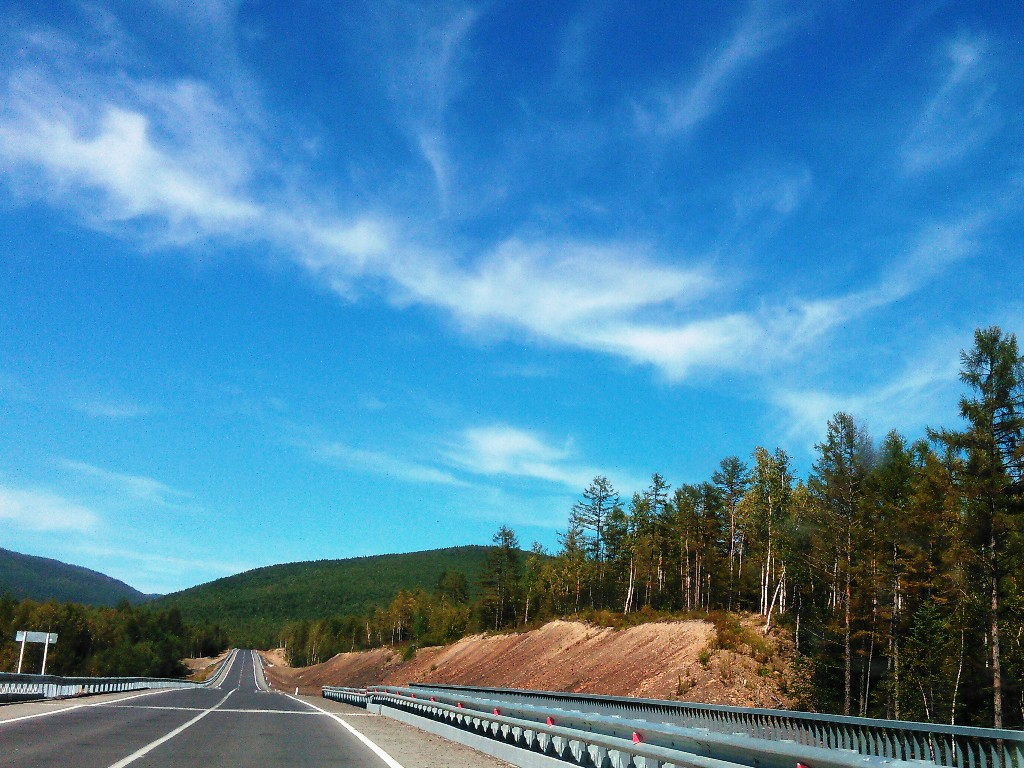 Автодорога Р454, участок Лидога - Ванино